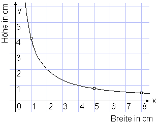 Schaubild: Antiproportionale Zuordnung